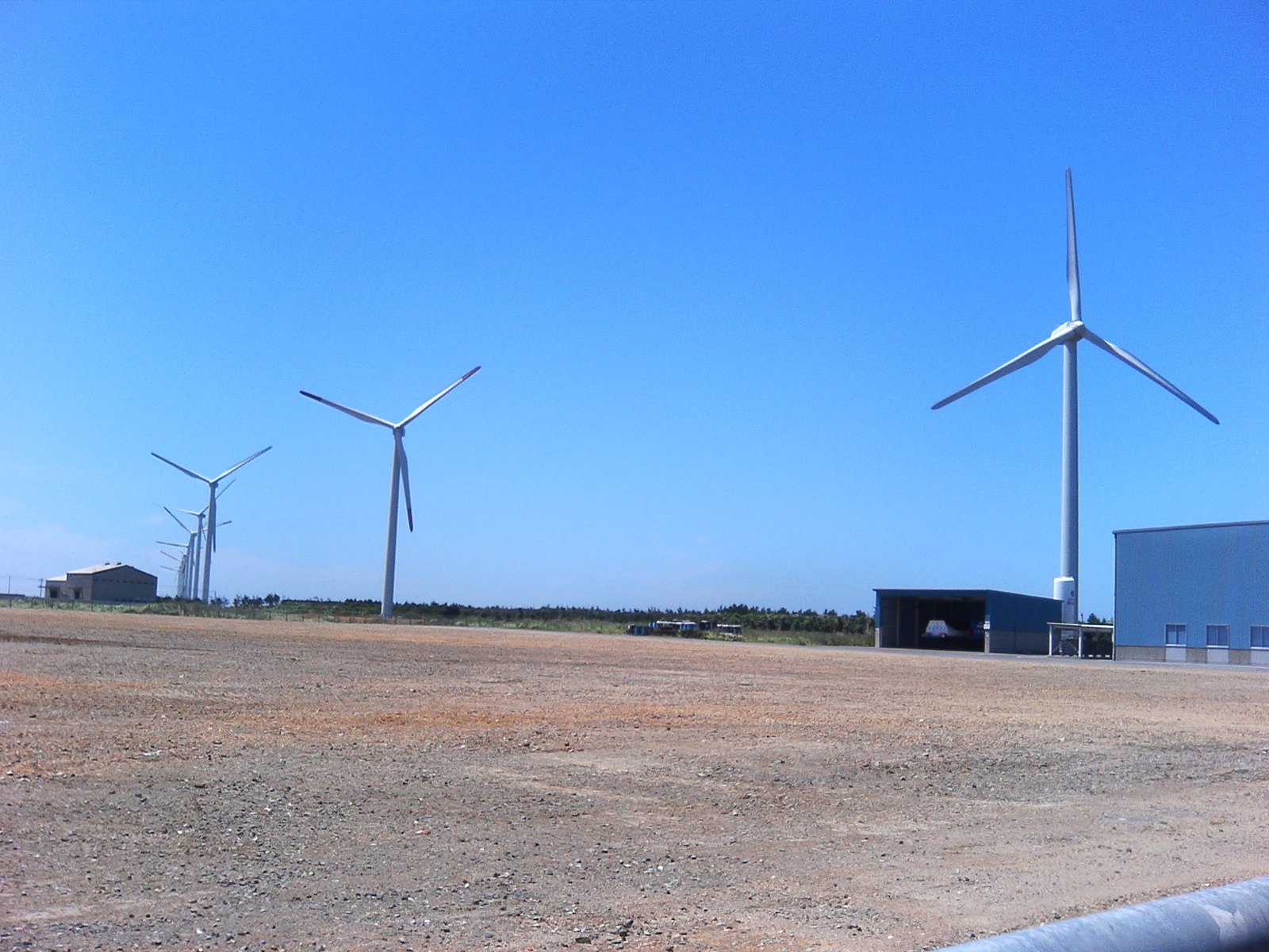 風力発電の風車群 エヌエスウインドパワーひびき